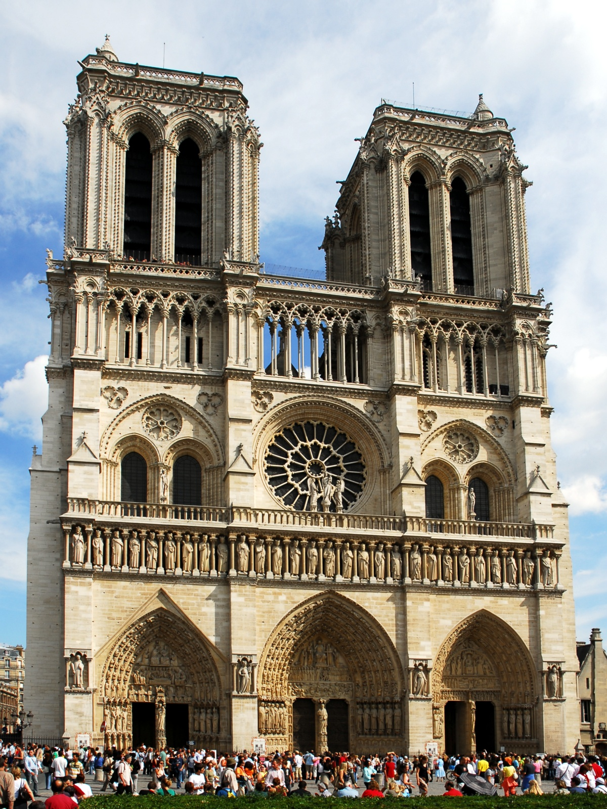 Façade ouest de la cathédrale Notre Dame de Paris, France